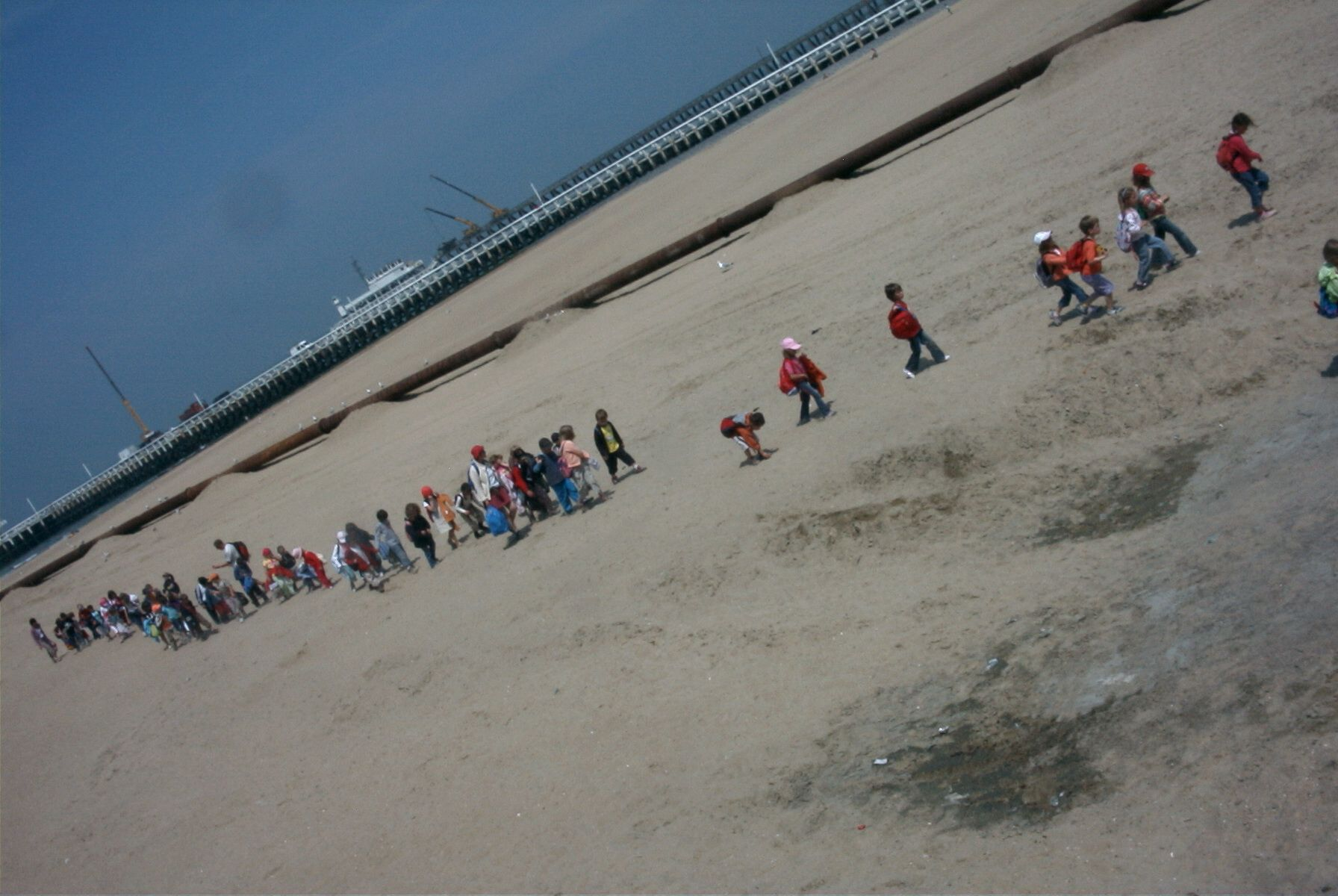 Belga tengerpart gyerekekkel, Oostende